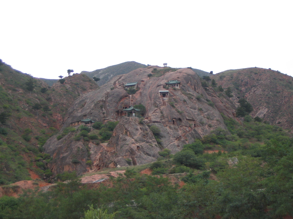 须弥山石窟。各窟分布在红色丹霞地貌的红色砂岩山上。